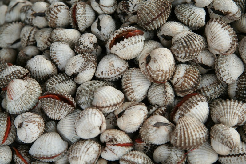 Tegillarca granosa (Linnaeus, 1758) ; Fresh Mussels at market